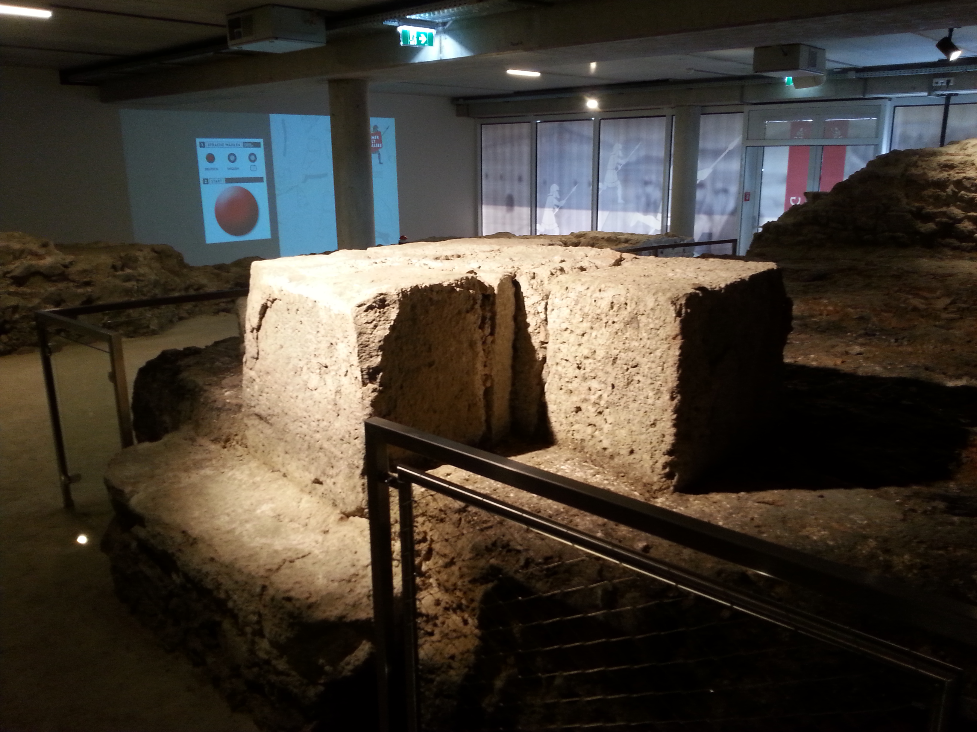 Restkastell Wallsee (A), Stützpfeiler der Mannschaftsunterkünfte.